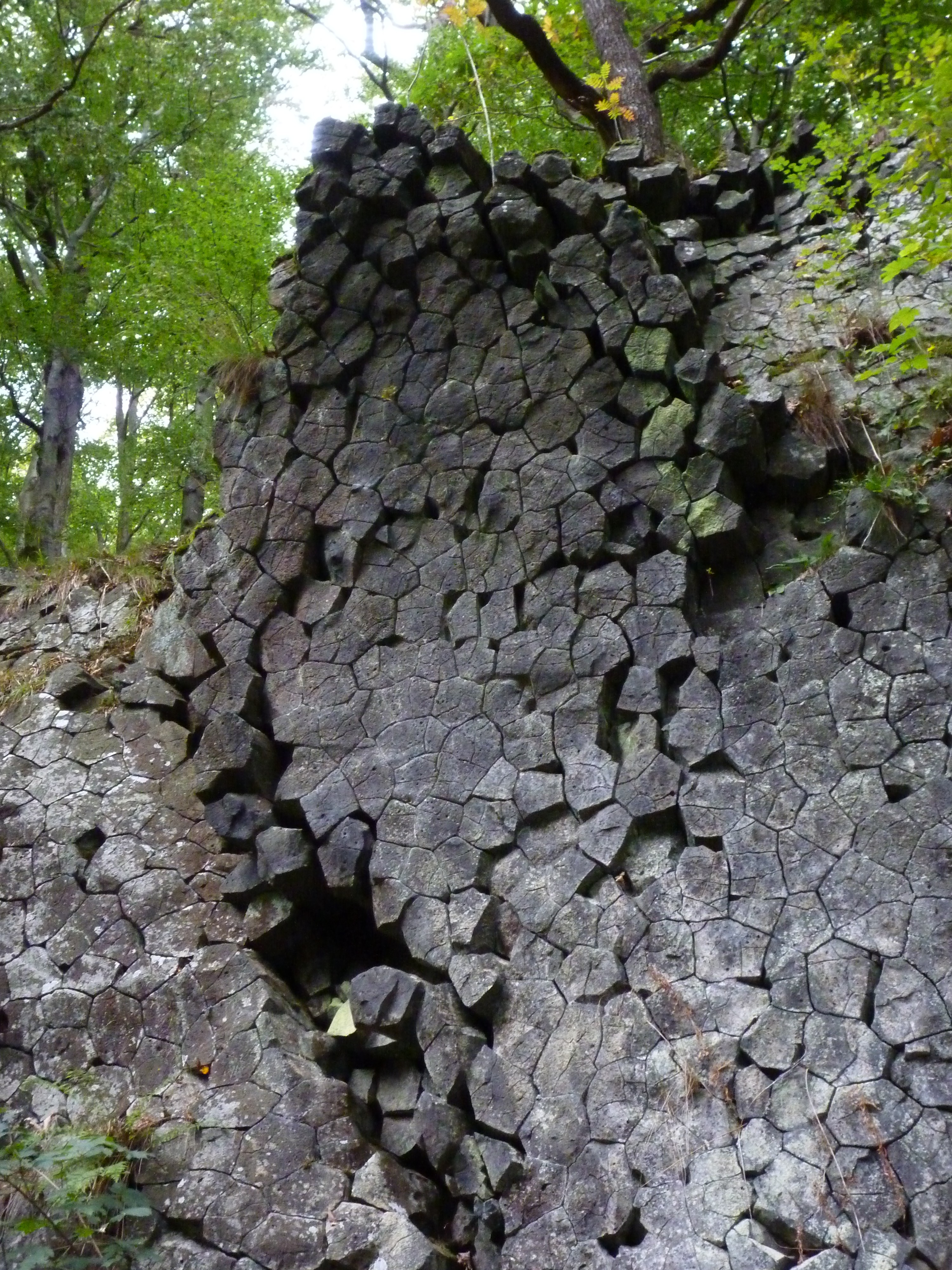 Hoher Meißne,Basaltdecke der Kitzkammer03